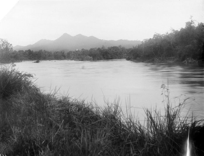 Repronegatief. Gezicht over de rivier Kampar in de omgeving van Moeara Takoes